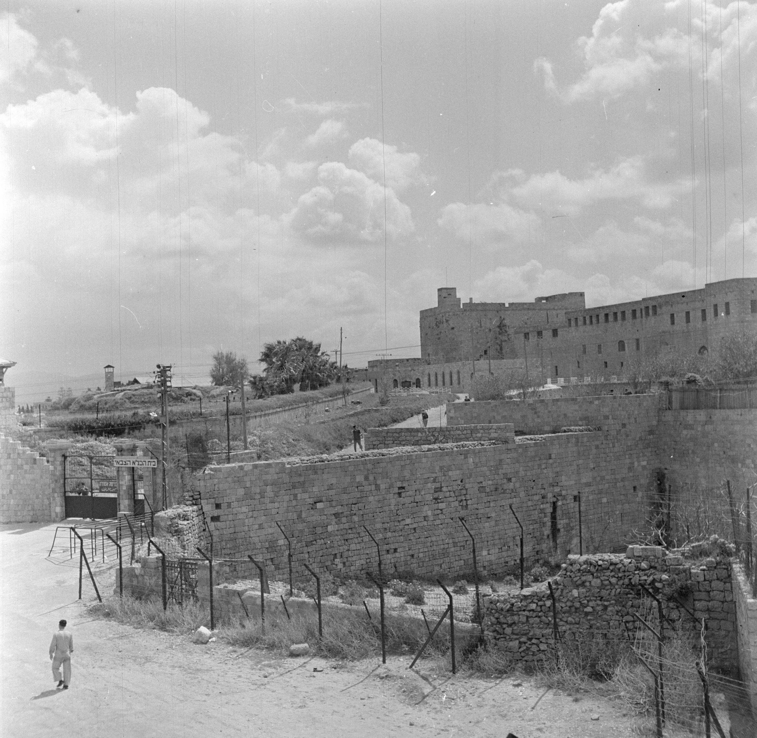 Gezicht op de gevangenis. Israël 1948-1949: Acre (Akko)